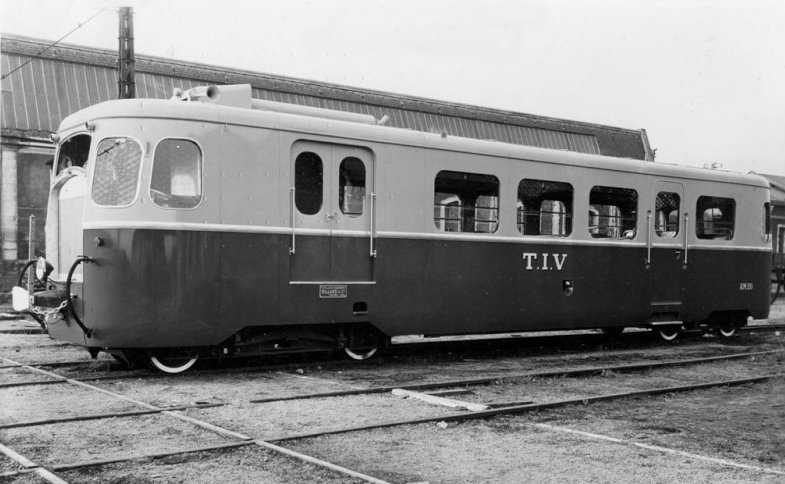 Autorail à voie métrique Billard A 150 D1 "porcinet", AM 20 des TIV (série 20 à 25), 1938.